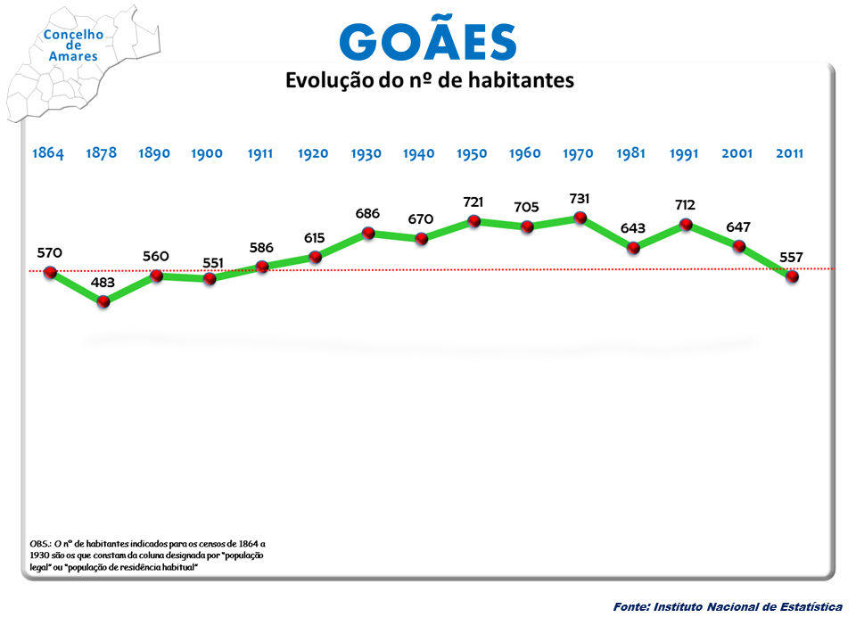 Censo 2011